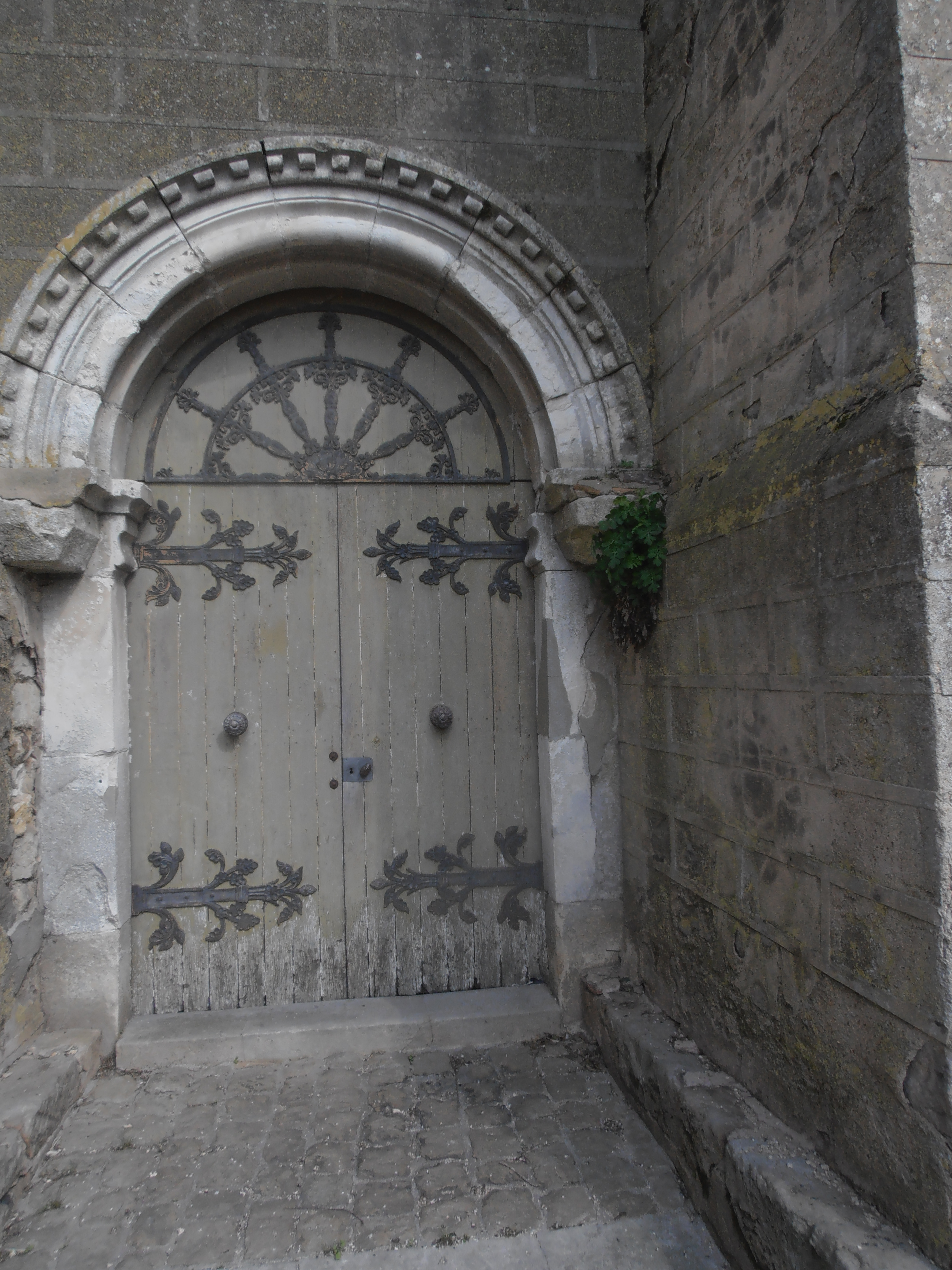 Portail du 13 eme siècle de l’Église de Sépeaux (Yonne) France à Archivoltes sculptées